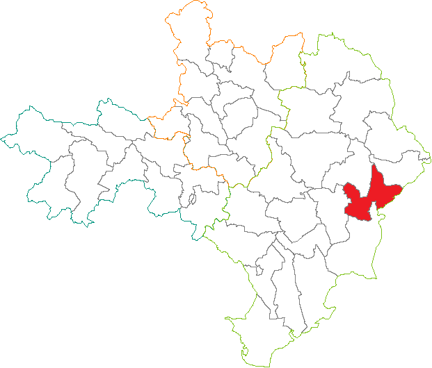 Situation du canton dans le département du Gard (France)